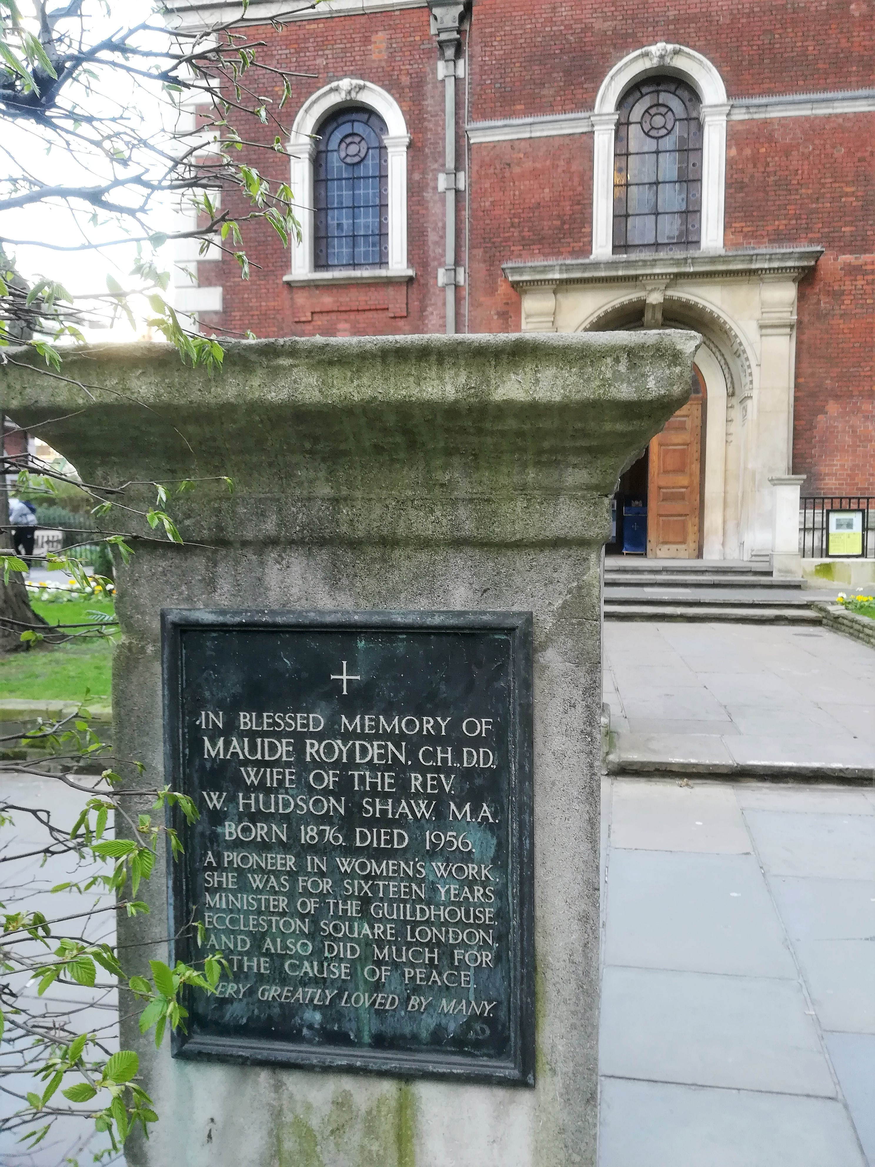 Kościół St Botolph-without-Bishopsgate w Londynie (tablica ku czci Maude Royden).